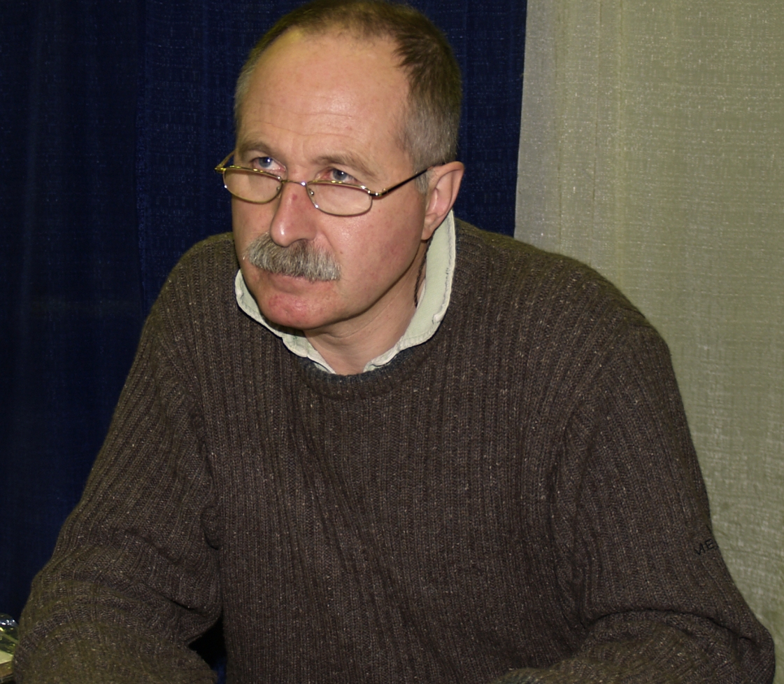 Brian Bolland en una Comic Con